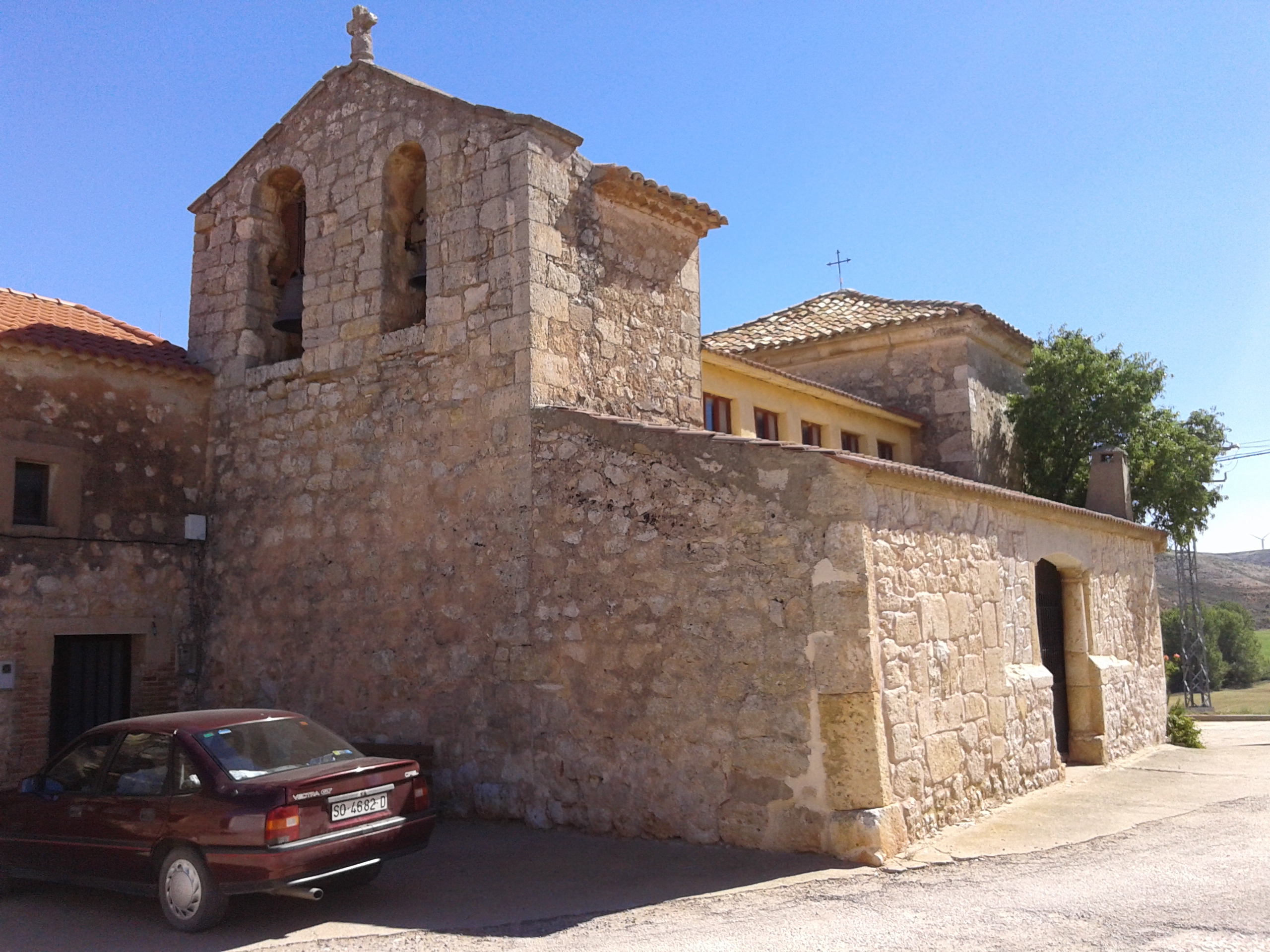 Jodra de Cardos Iglesia de Santa Maria la Mayor